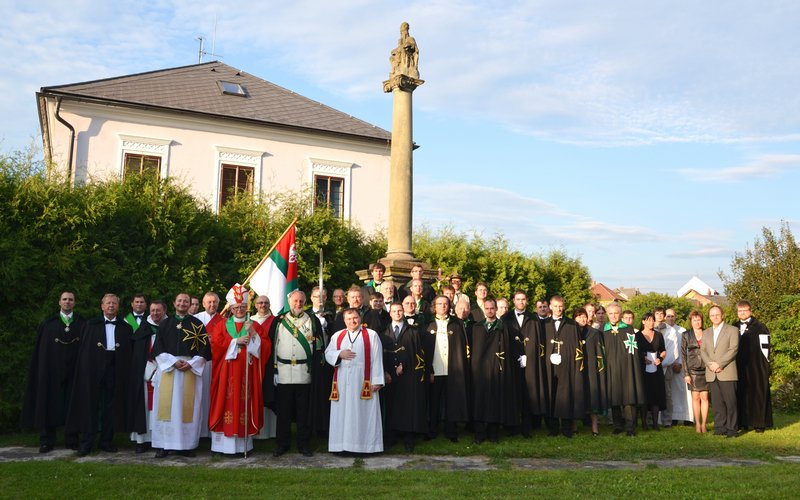 Generálna kapitula Českého Veľkopriorstva OSLJ v roku 2011 v Bludove